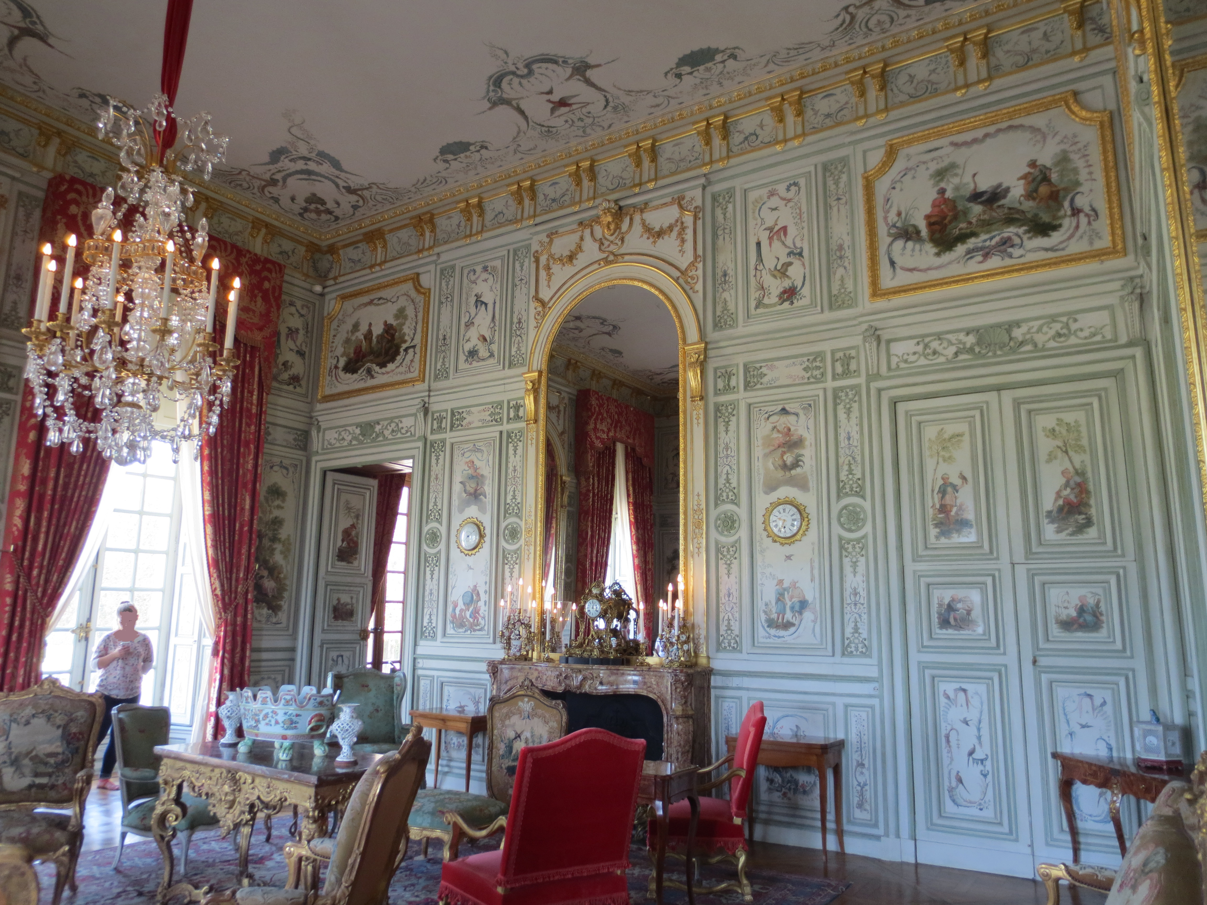 Salon chinois du château de Champs-sur-Marne, après restauration